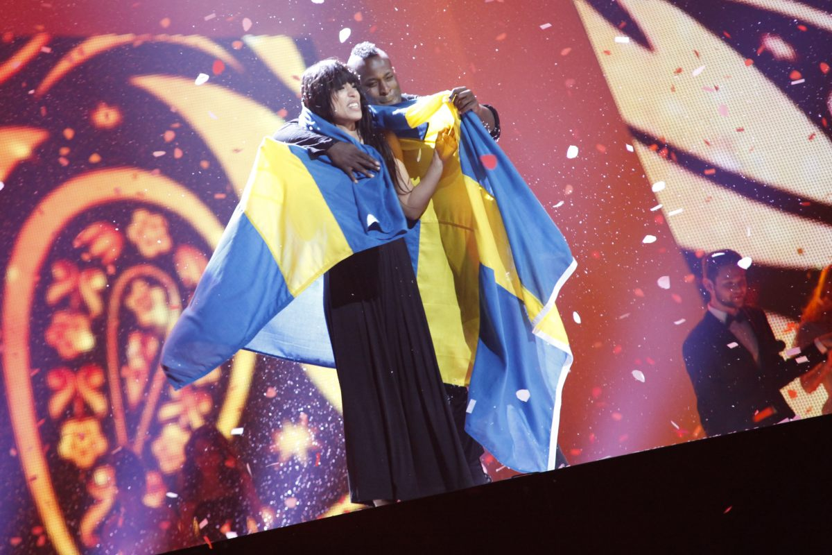 Loreen proclamándose ganadora del Festival de la Canción de Eurovisión de 2012,celebrado en Bakú,con 372 puntos.